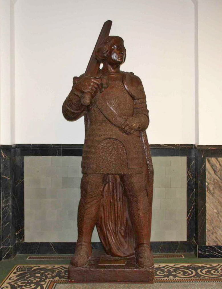 Die genagelte Reinoldusfigur im Dortmunder Rathaus